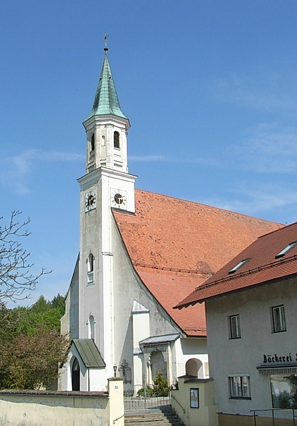 Pfarrkirche St. Andreas in Holzkirchen